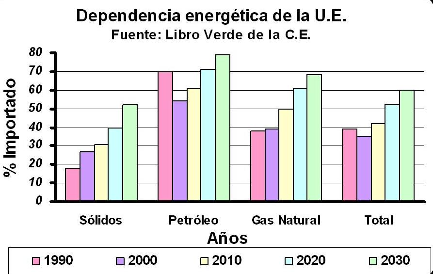 Dependencia Energética de la U.E.